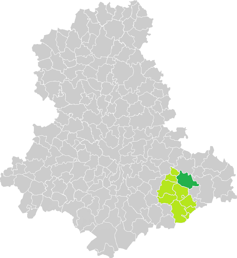 Carte de situation de la commune de Neuvic-Entier (en vert foncé) dans le votre Canton (en vert clair) sur une carte des communes de la Haute-Vienne